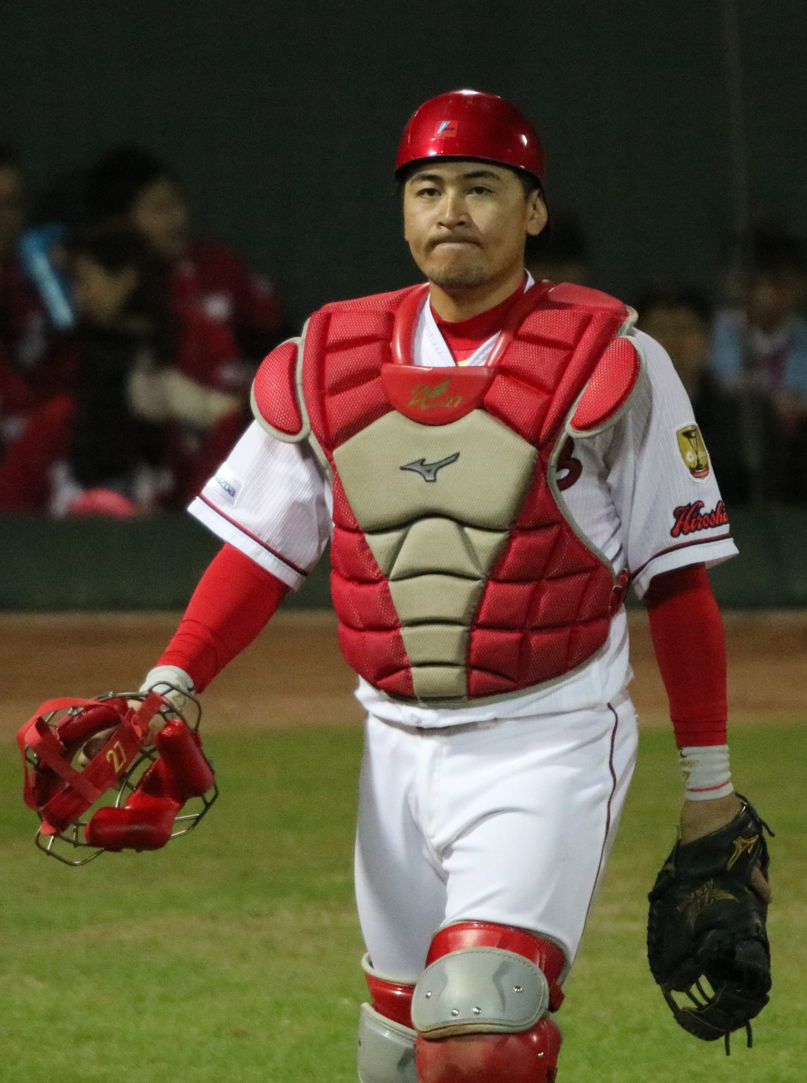 2017/10/24マツダスタジアム